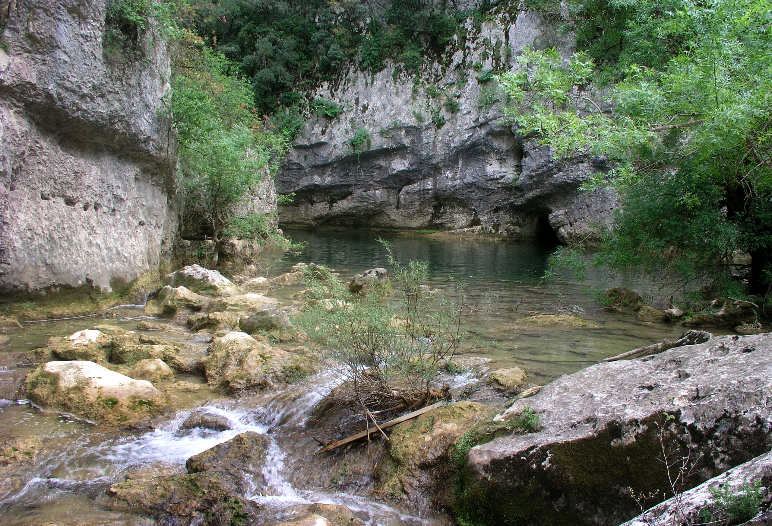 Le Lamalou au ravin des Arcs, Notre-Dame-de-Londres, Hérault, France.